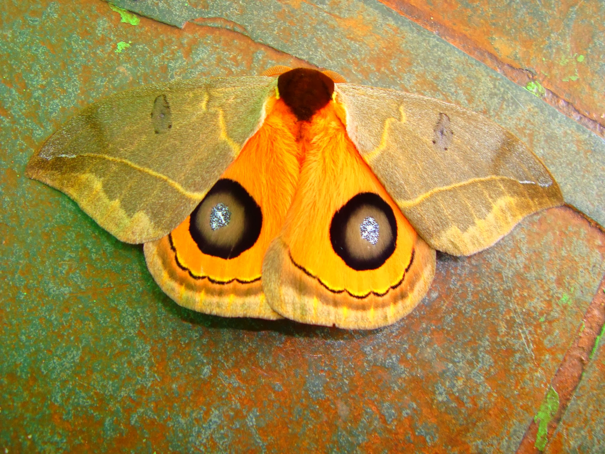 BORBOLETA USANDO MIMETISMO FERRAMENTA DE PROTEÇÃO. DE PERTO PARACEM DOIS GRANDE OLHOS! E O DETALHES PARECEM PRATA RELUZENTE. DEUS É PERFEITO.